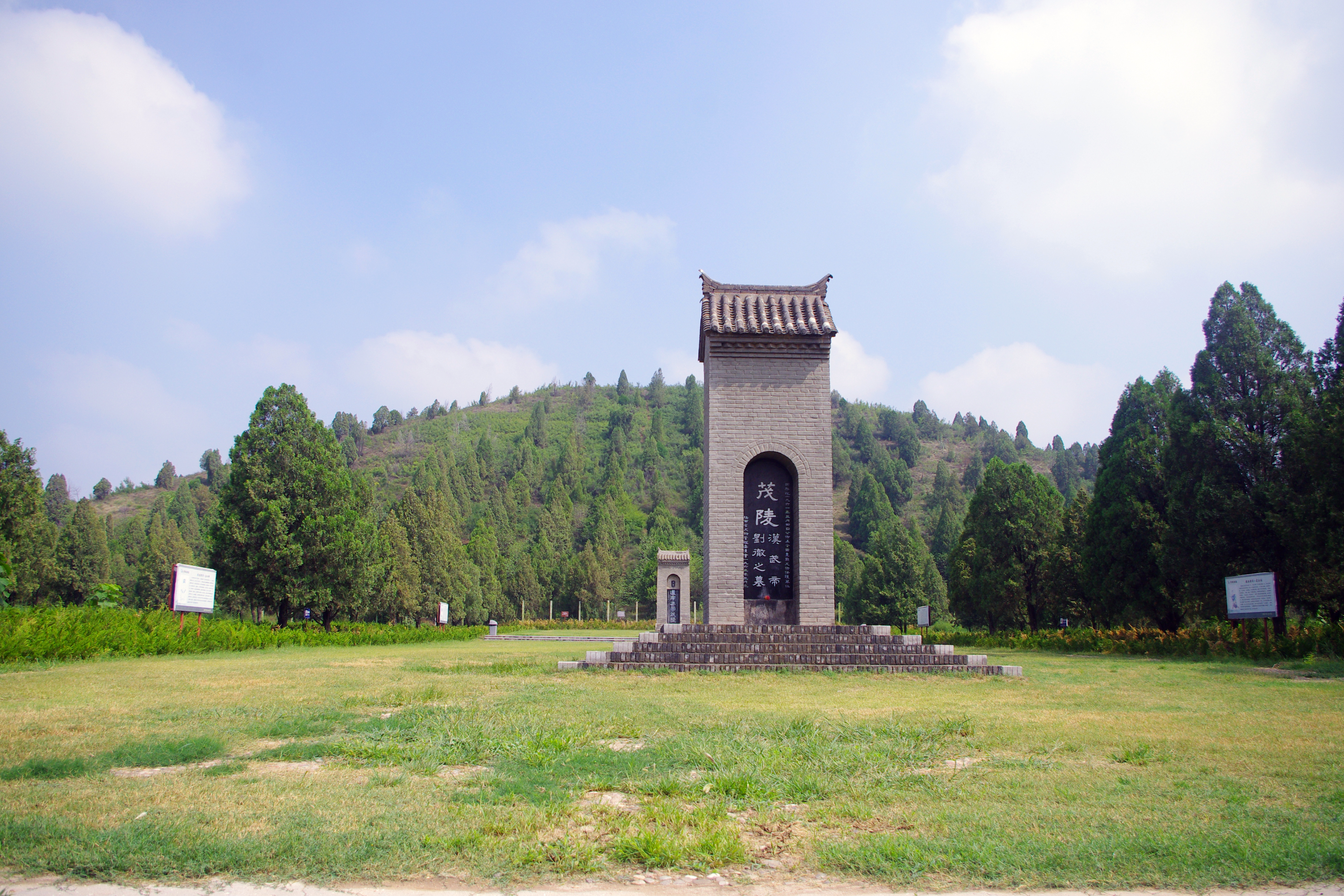 汉武帝茂陵